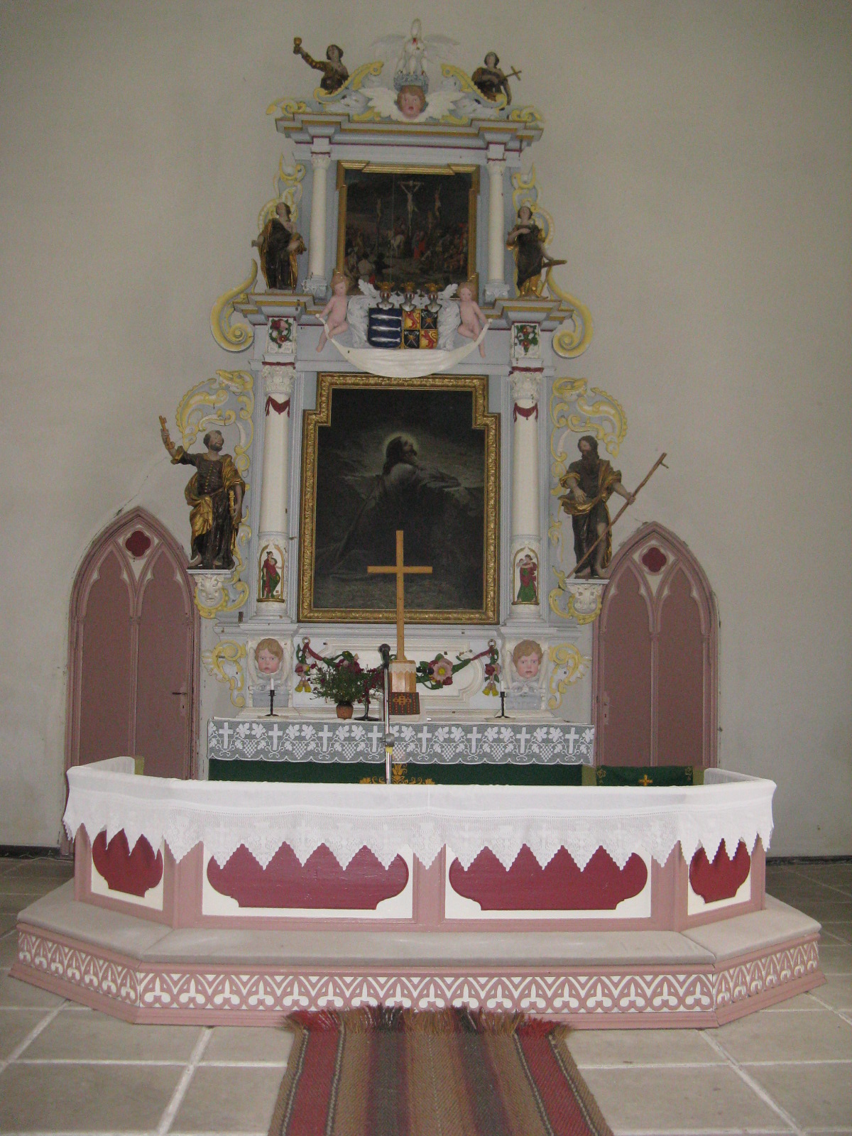 Vigala kiriku altar